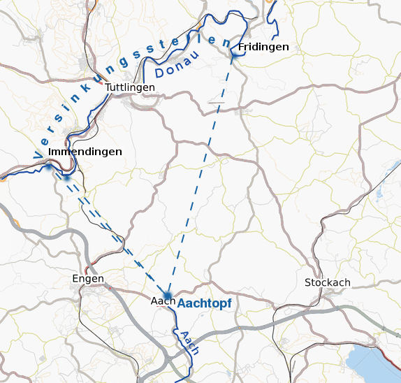 Schematische Karte der Donauversinkung